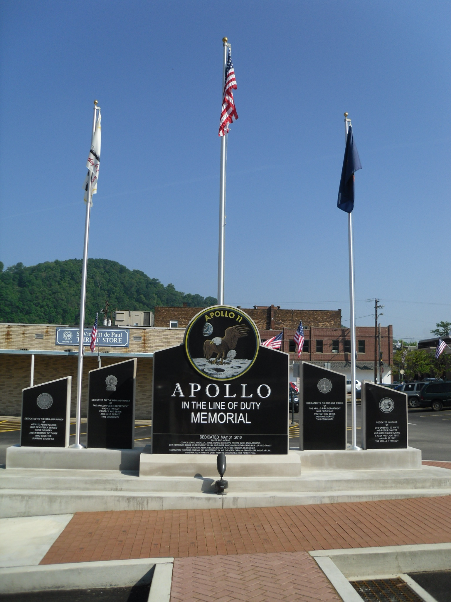 Apollo, Pennsylvania